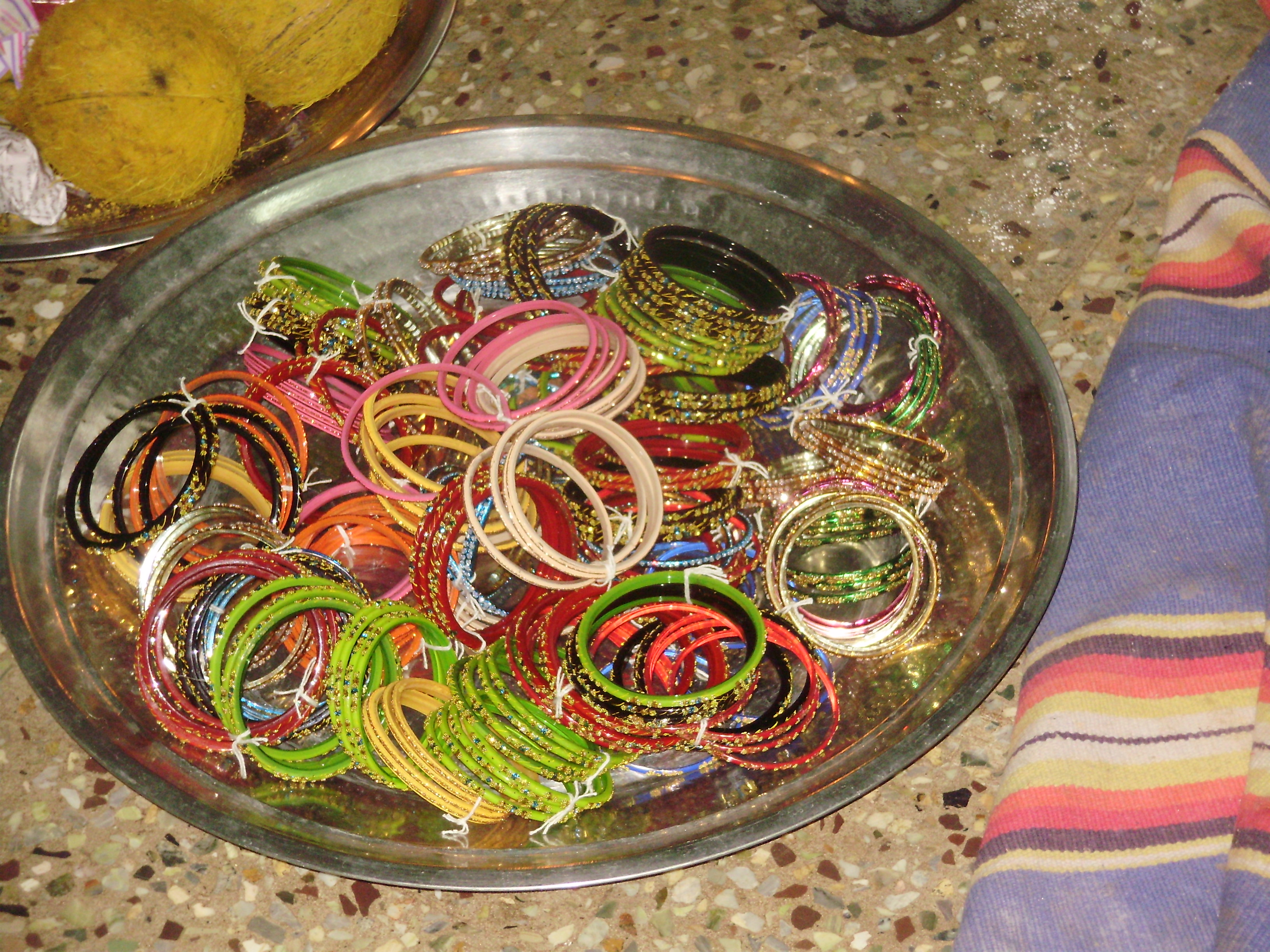 bangles for the prgnanat lady